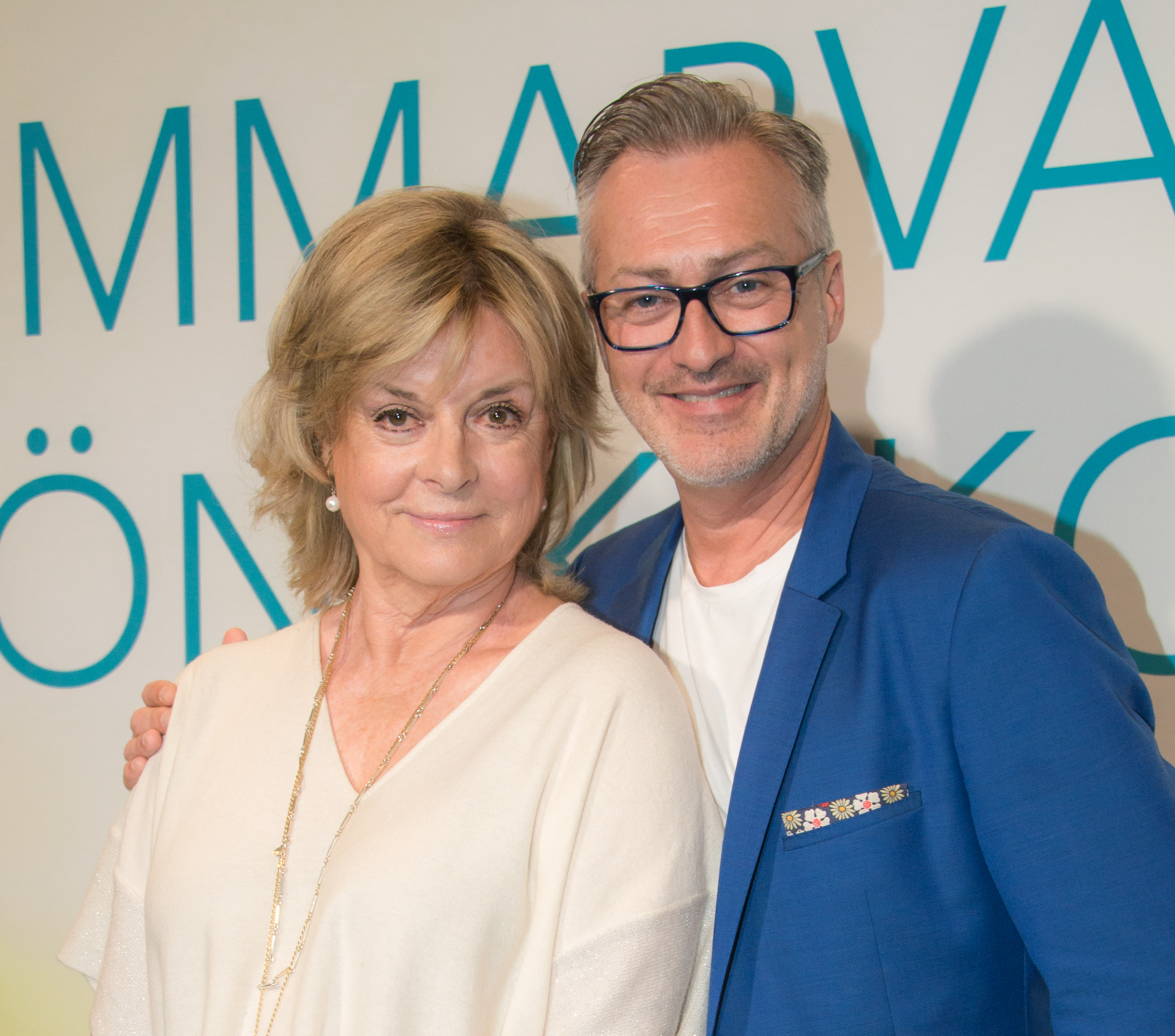 Grynet Molvig och Tony Irving, Sommarvärdar i P1, på röda mattan på väg in i Berwaldhallen i Stockholm den 13 juni 2019.